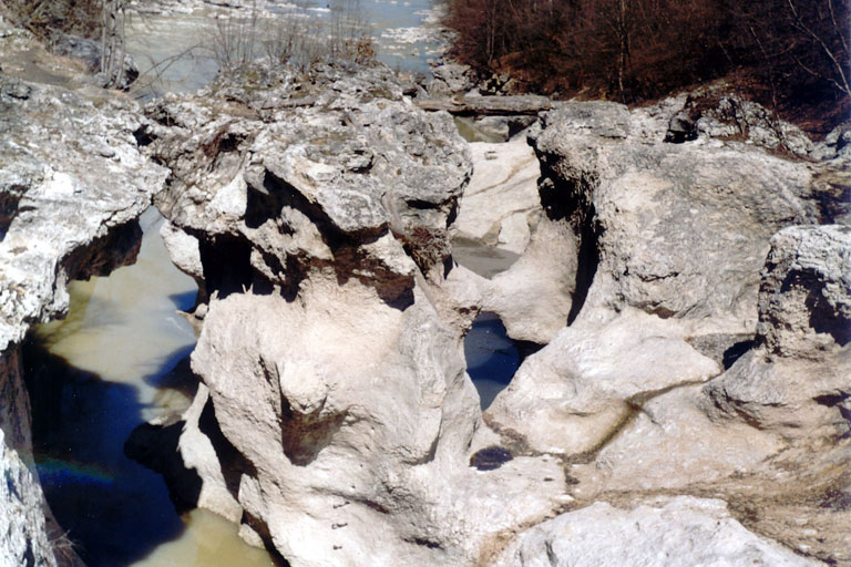 Реката Белаја.